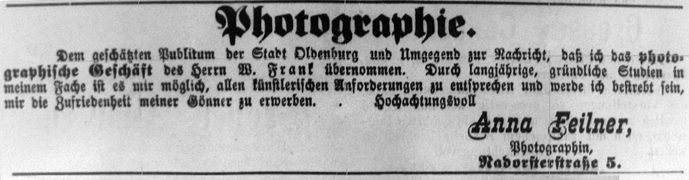 Eröffnungsanzeige